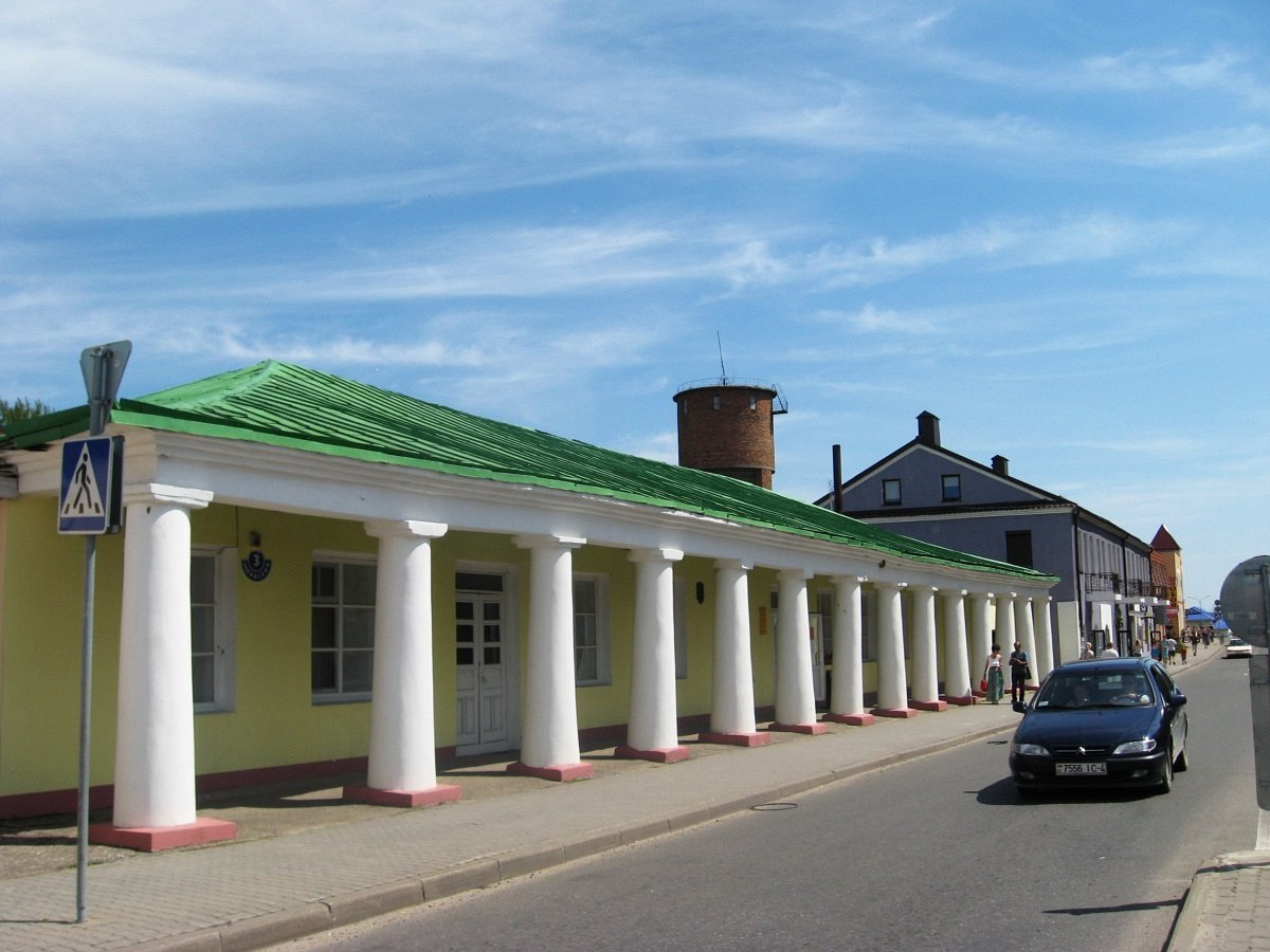 Навагрудак. Гандлёвыя рады